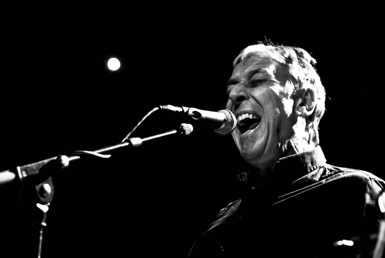 John Cale at Le Chabada, Angers, France, 14 October 2011